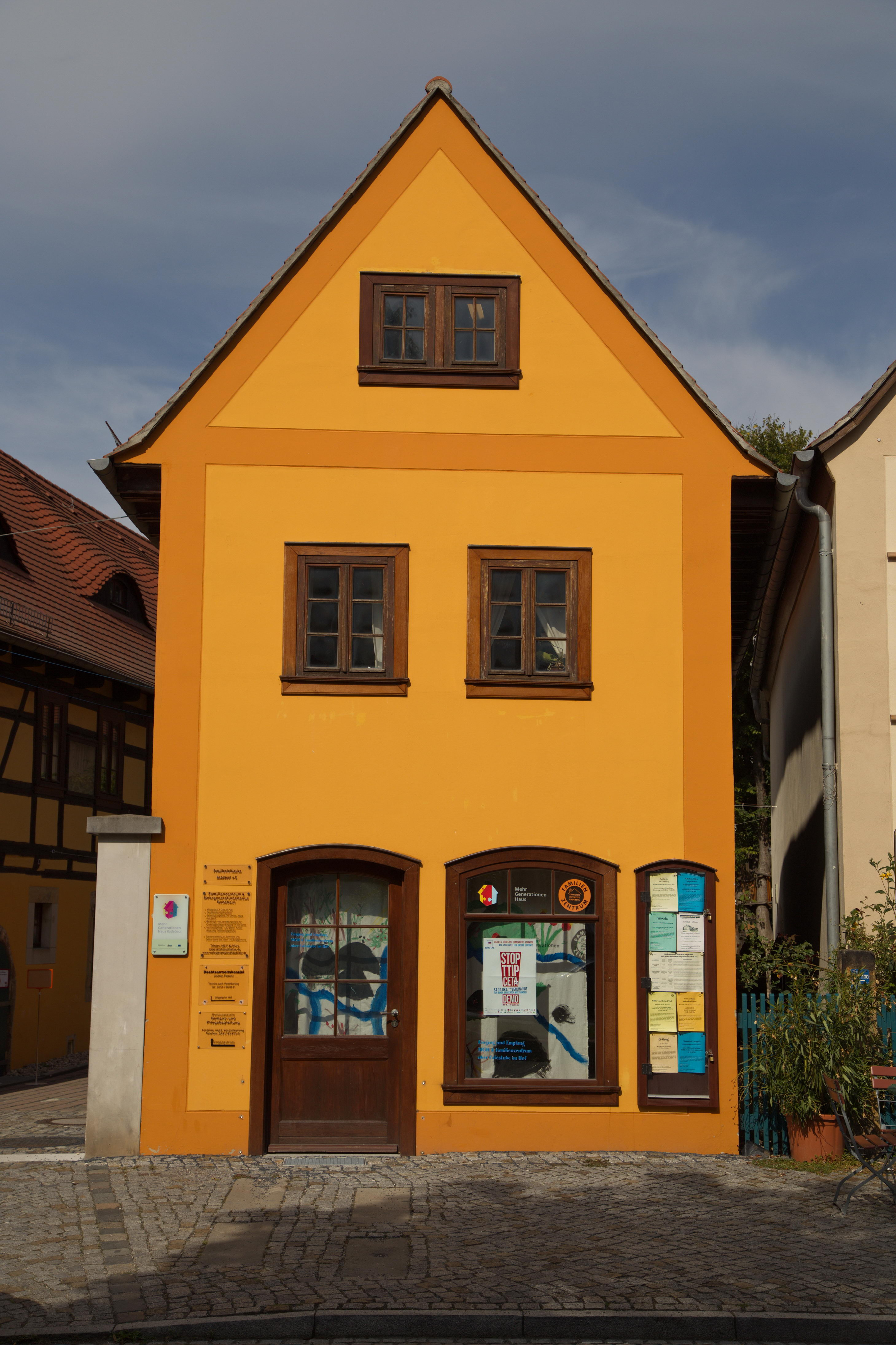 Radebeul, angrenzender Dreiseithof, Fachwerkhaus Altkötzschenbroda 20